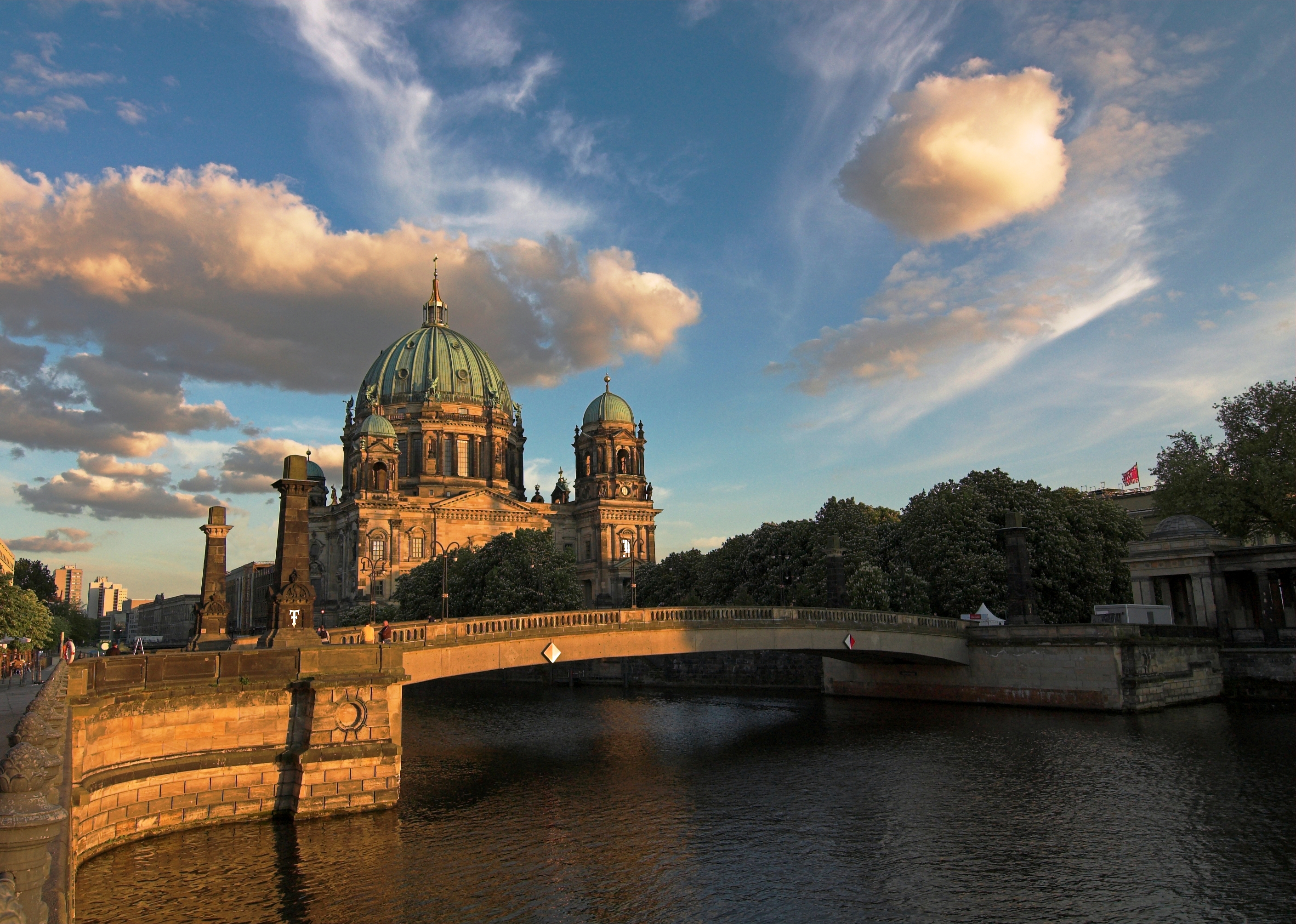 Abendstimmung Berliner Dom mit Friedrichsbrücke im Vordergrund